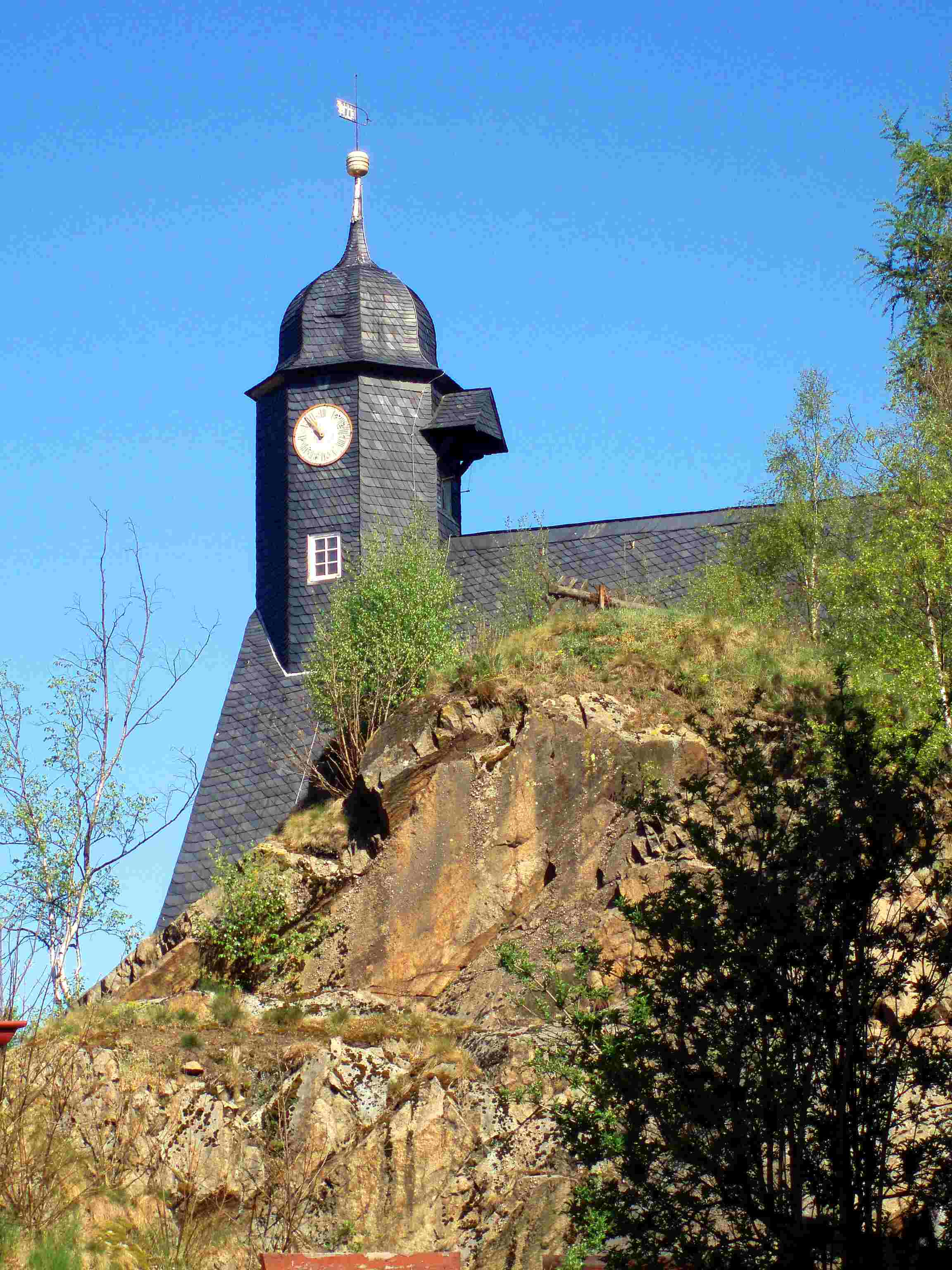 Blick zur Kirche Trautenstein